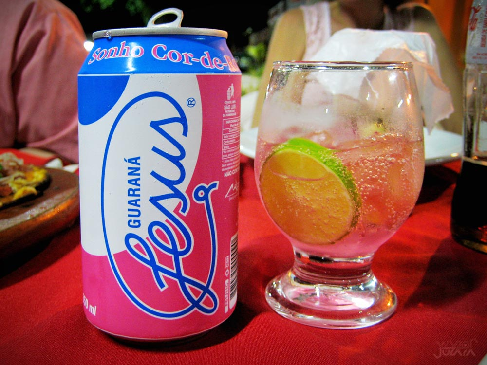 O Guaraná Jesus, refrigerante típico do Maranhão.No title given